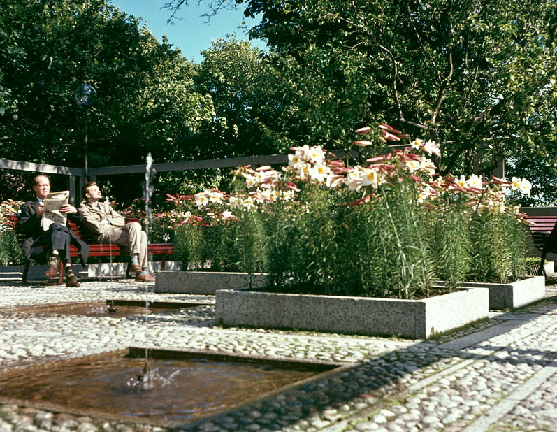 Vasaparkens terrass mot Torsgatan